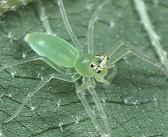 female Onomastus kanoi from Okinawa.